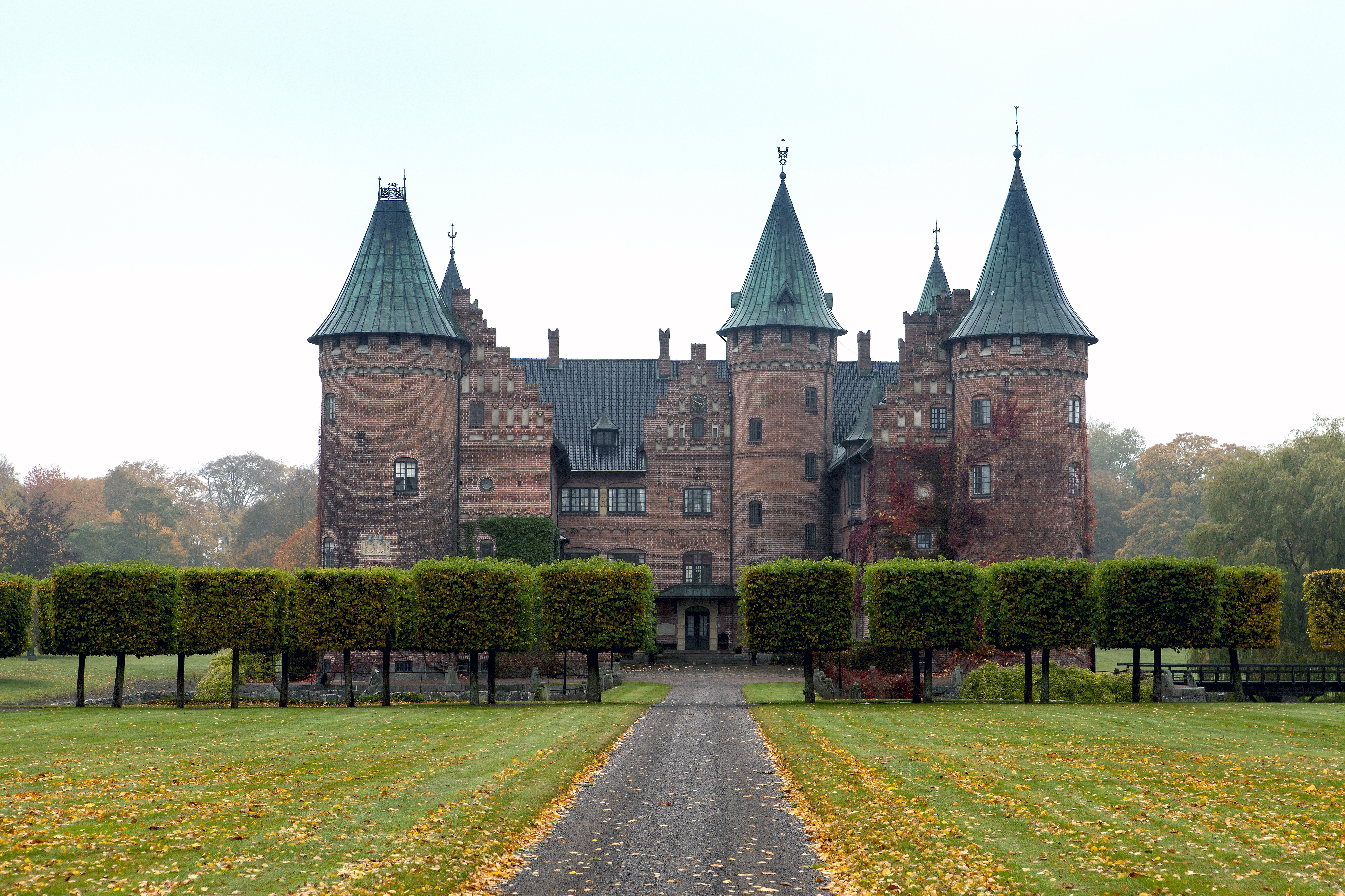 Trolleholms slott (castle) utanför Eslöv. Slottet hyrs idag ut till Trolleholms Slott AB som via nyttjandandelar upplåter det som plats för möten för företag. Trolleholms gods ägs idag av Carl Trolle-Bonde som privat egendom, fram till 1974 var det ett fideikommiss. Slottet har anor från 1538 och borgen Eriksholm som uppfördes av danska riksrådet Tage Ottesen Thott och som brändes ned under dansk-svenska kriget 1678. Efter förfall byggdes slottet om på 1750-talet och fick sitt nuvarande utseende på 1800-talet under ledningen av den danske arkitekten, etatsrådet Ferdinand Meldahl. Då inreddes biblioteket som idag rymmer en av Nordeuropas största boksamlingar med cirka 45.000 volymer. Trolleholms eget lantbruk omfattar cirka 1.500 hektar. Photo: News Øresund - Johan Wessman © News Øresund(CC BY 3.0) Detta verk av News Øresund är licensierat under en Creative Commons Erkännande 3.0 Unported-licens (CC BY 3.0). Bilden får fritt publiceras under förutsättning att källa anges. The picture can be used freely under the prerequisite that the source is given. News Øresund, Malmö, Sweden. Øresund är en oberoende regional nyhetsbyrå som ingår i projektet Øresund Media Platform som drivs av Øresundsinstituttet i partnerskap med Lunds universitet och Roskilde Universitet och med delfinansiering från EU (Interreg IV A Öresund) och 14 regionala; icke kommersiella aktörer.